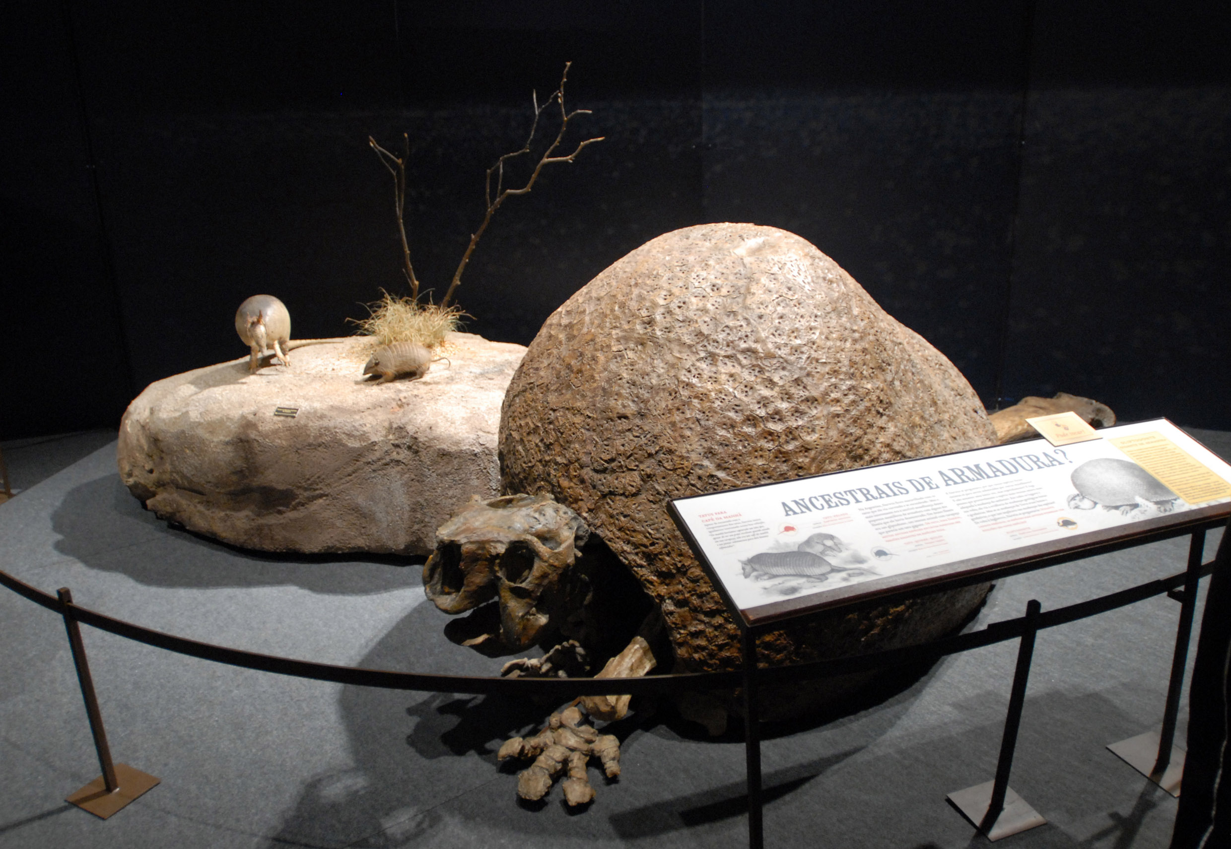 Exposição que marca os 200 anos do nascimento do naturalista Charles Darwin, na Esplanada dos Ministérios, em Brasília